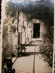 Torre Albori con cartiera e spiaggia privata appartenuta al Casato Mellucci di Napoli . Foto scattata nel 1932 in terrazza ingegnere G. Luigi Mellucci . Arch. priv. Giorgio Mellucci